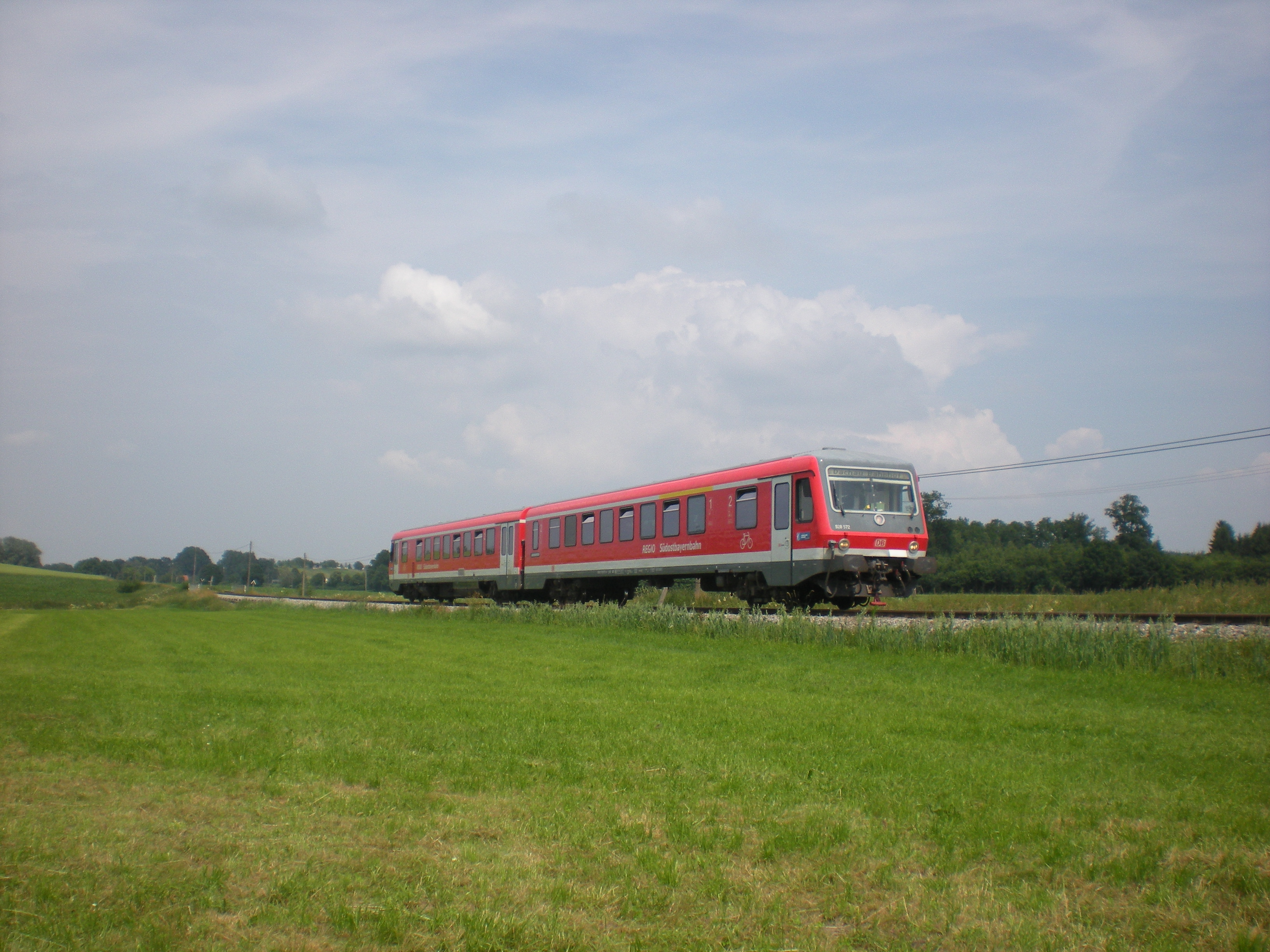 Dieseltriebwagen der Baureihe 628 auf der Linie A der S-Bahn München zwischen Schwabhausen und Niederroth